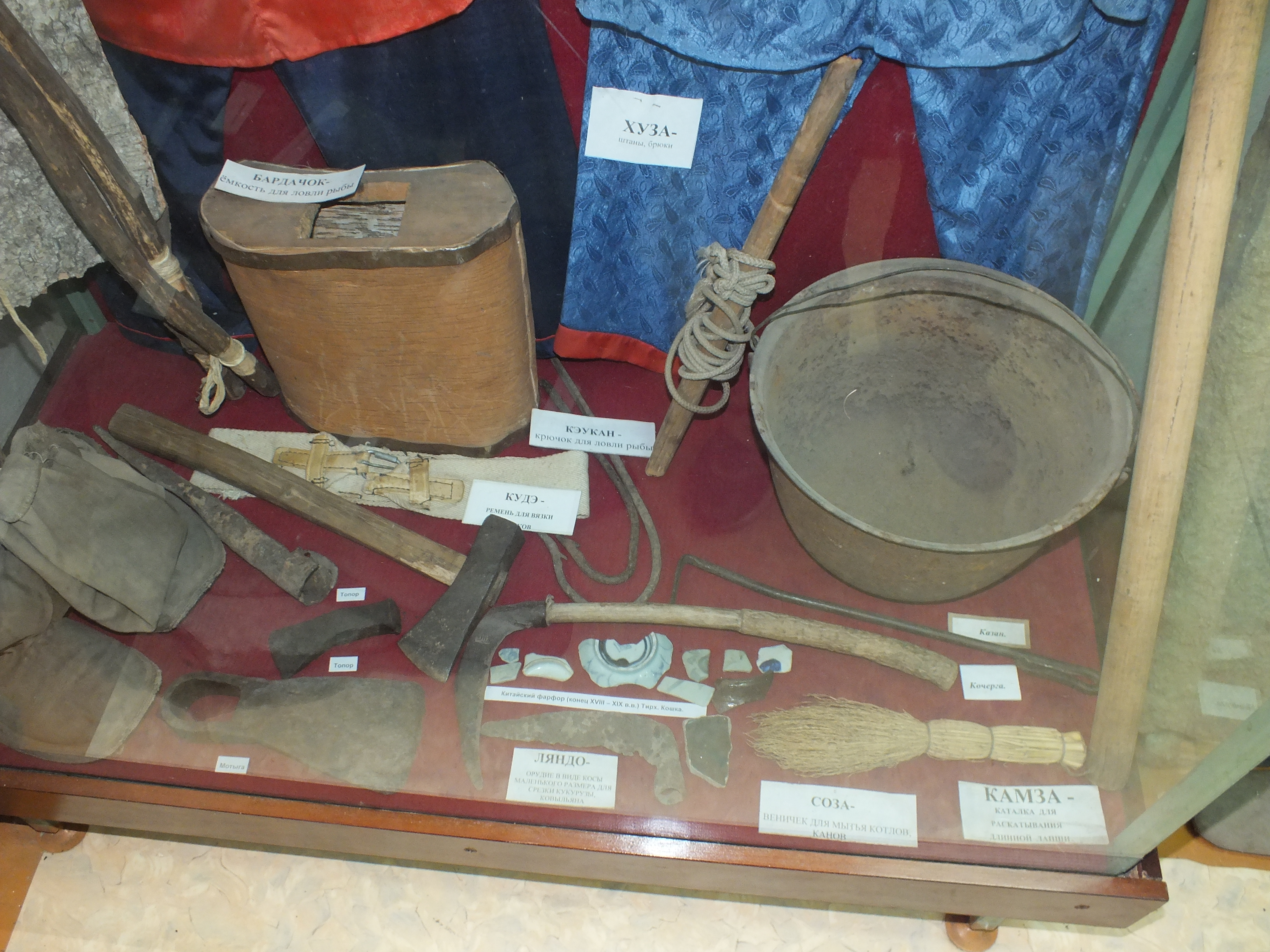 Тазы, малая коренная народность Дальнего Востока России